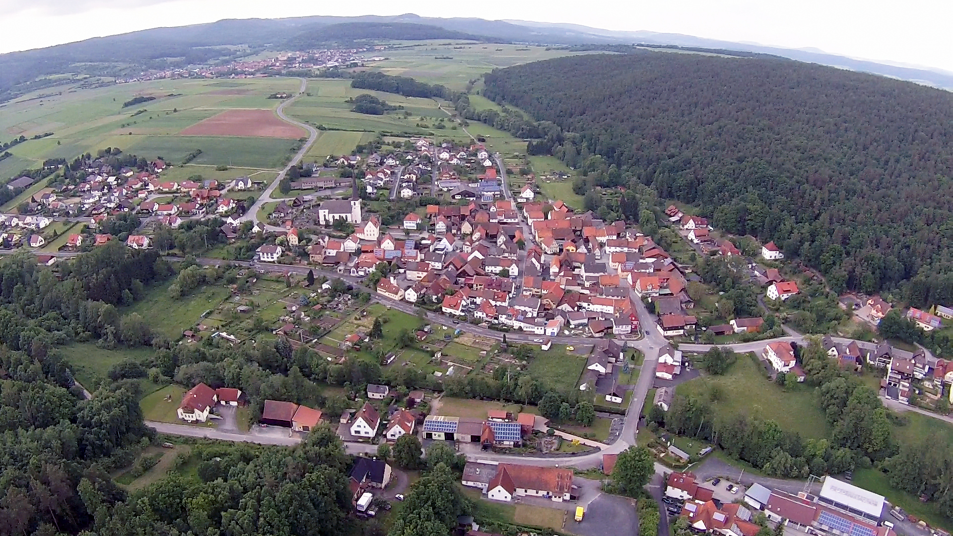 Aufbau des Dorfes Unterelsbach. Der alte Ortskern unterhalb der Kirche ist gut zu erkennen. Im Hintergrund am Fuße des Gangolfsberg und Dünsberg liegt Oberelsbach. Der Verlauf des Baches Els sowie Sonder der Zusammenfluss in der rechten unteren Ecke des Fotos sind gut zu Erkennen.